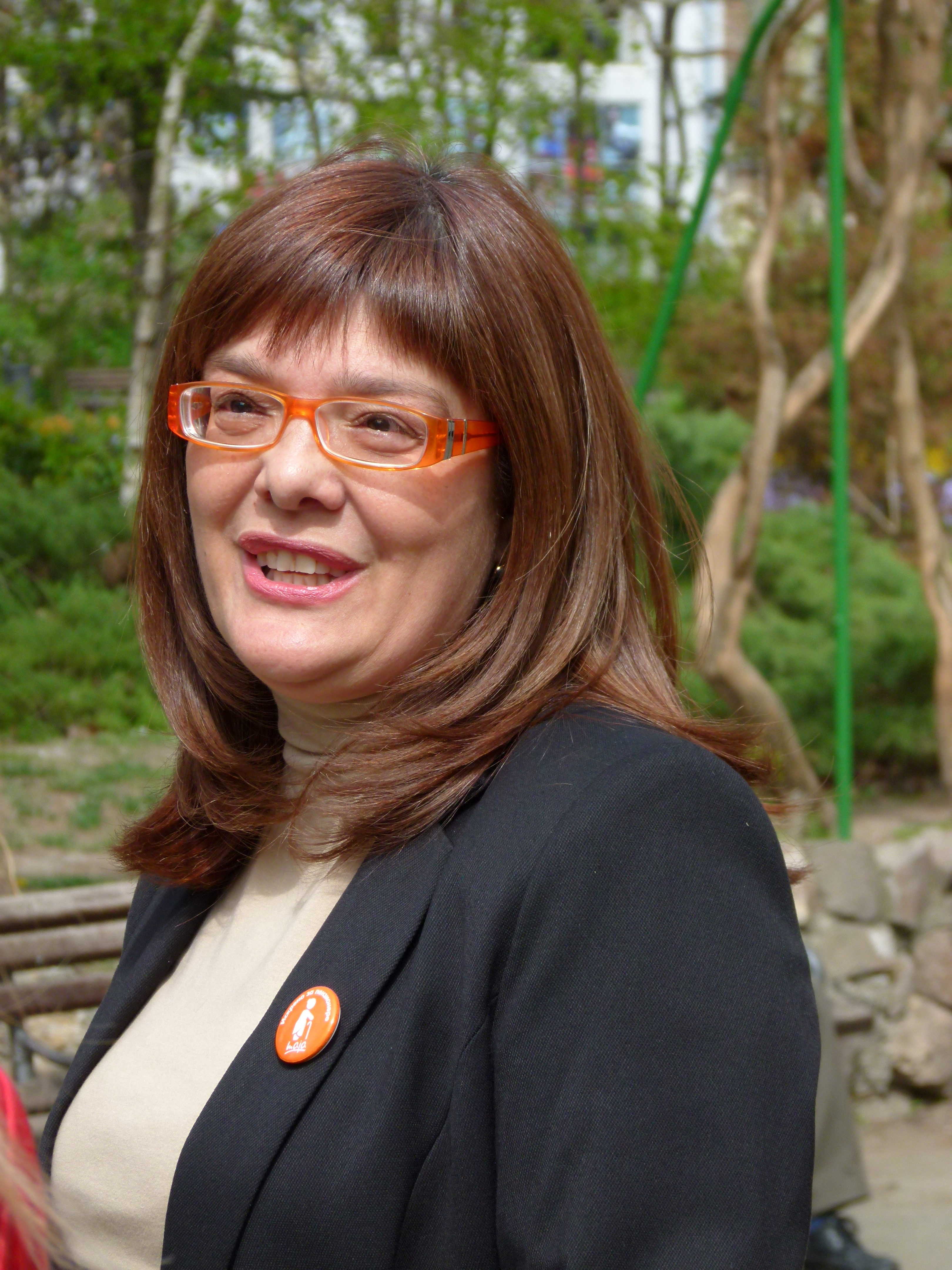 Predstavljen deo programa "3x5" iskreno za penzionere: Podelićemo 13. penziju svim novosadskim penzionerima. Otvorićemo pet novih klubova penzionera.